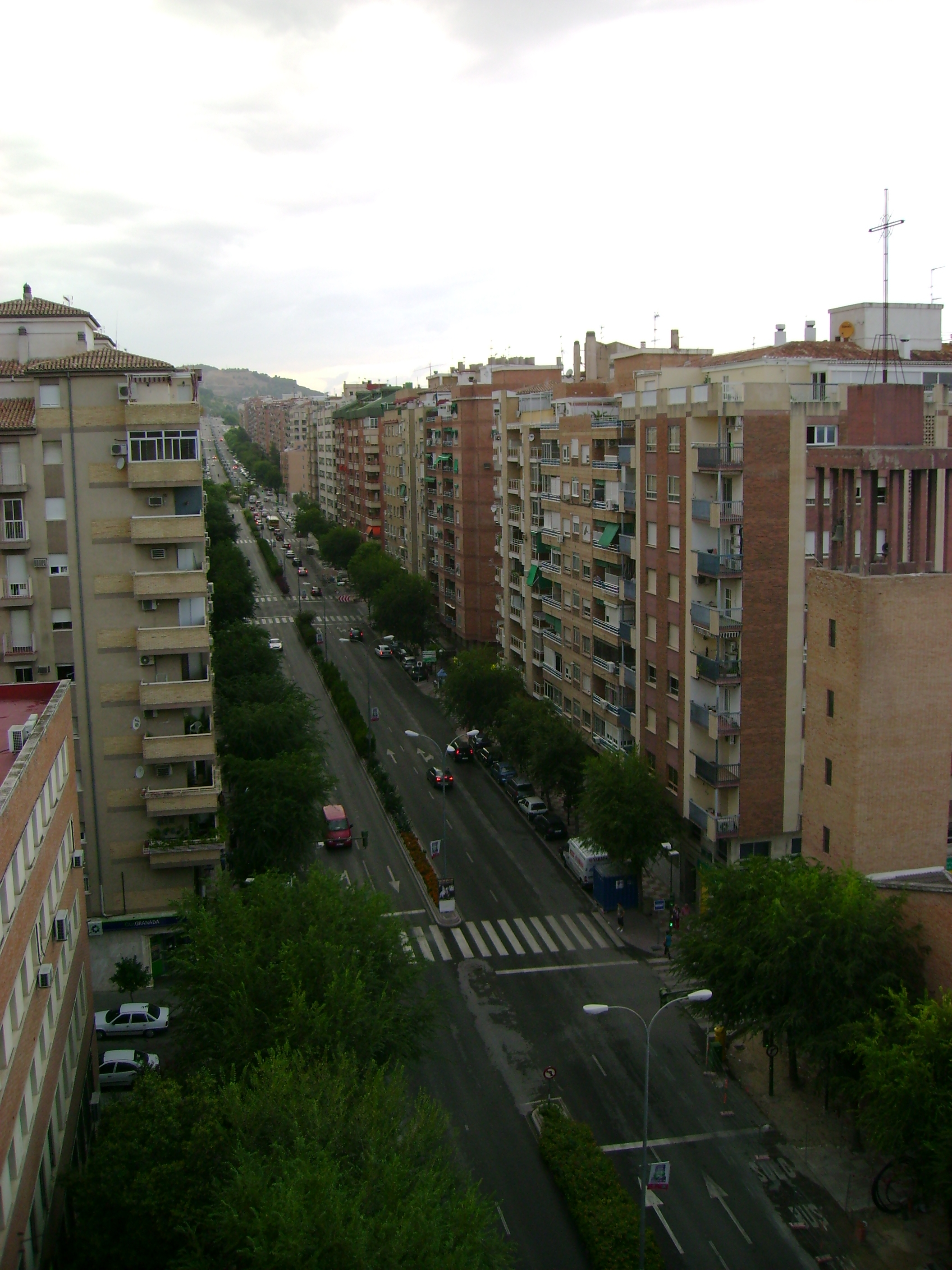 Gran Eje, oficialmente la Avenida de Andalucía de Jaén.